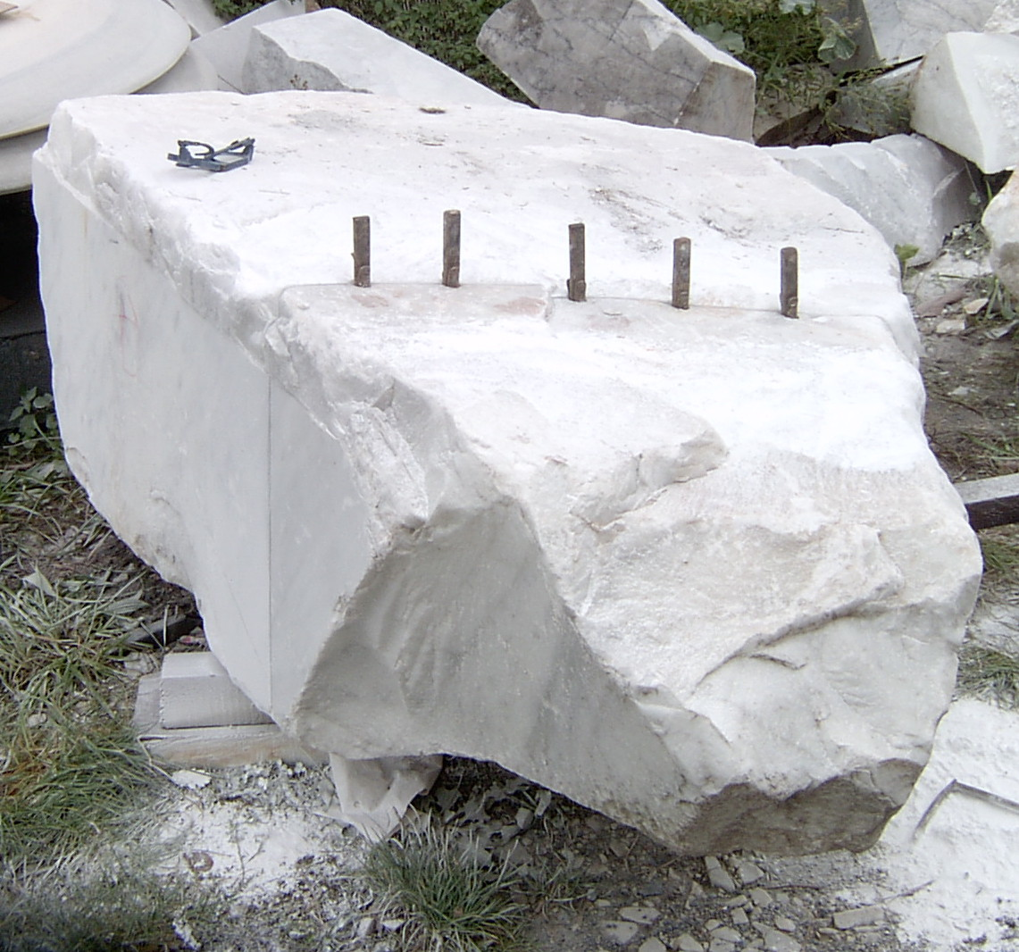 Spalten